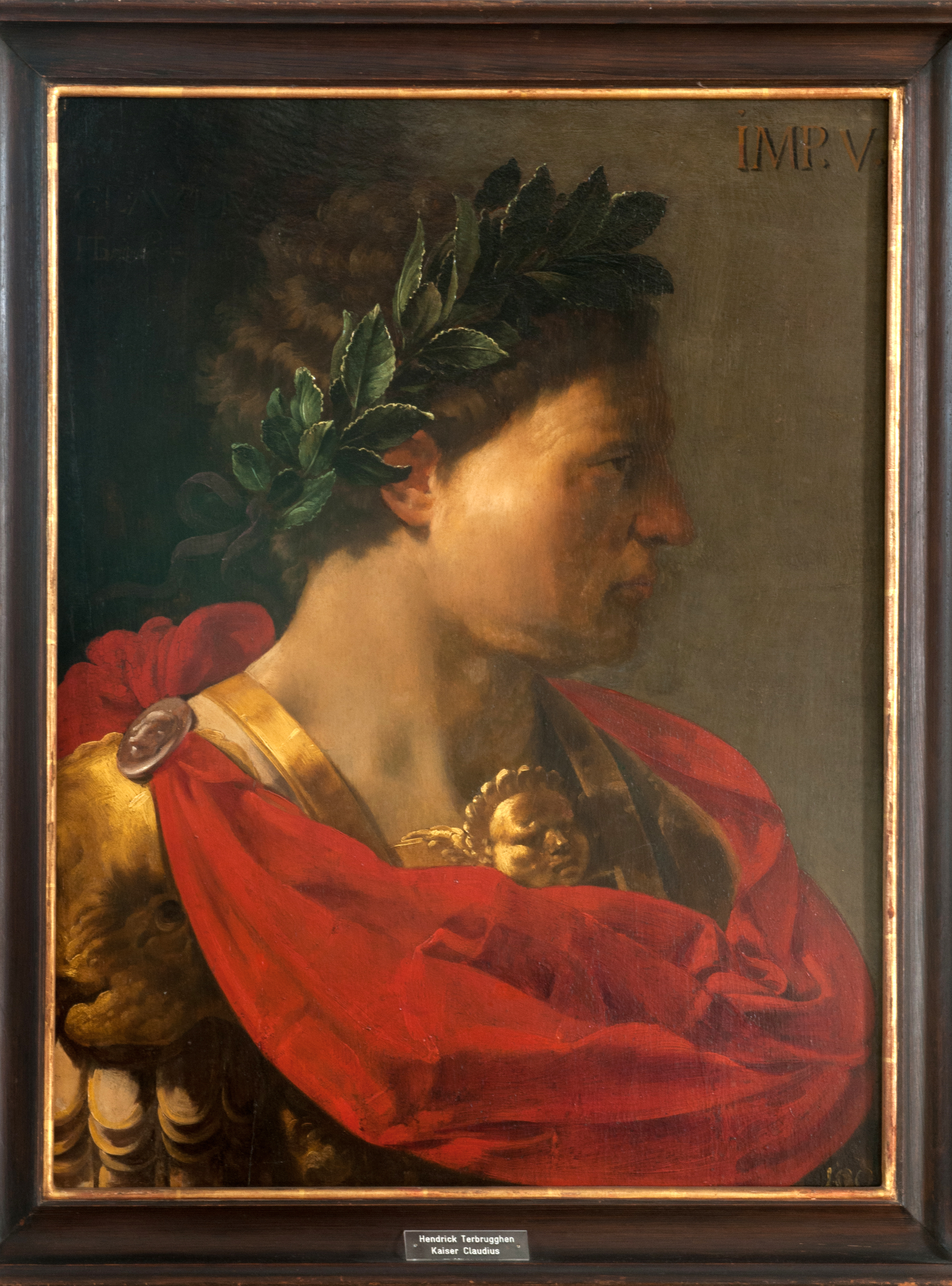 Teil einer Serie römischer Kaiserporträts niederländischer und flämischer Maler